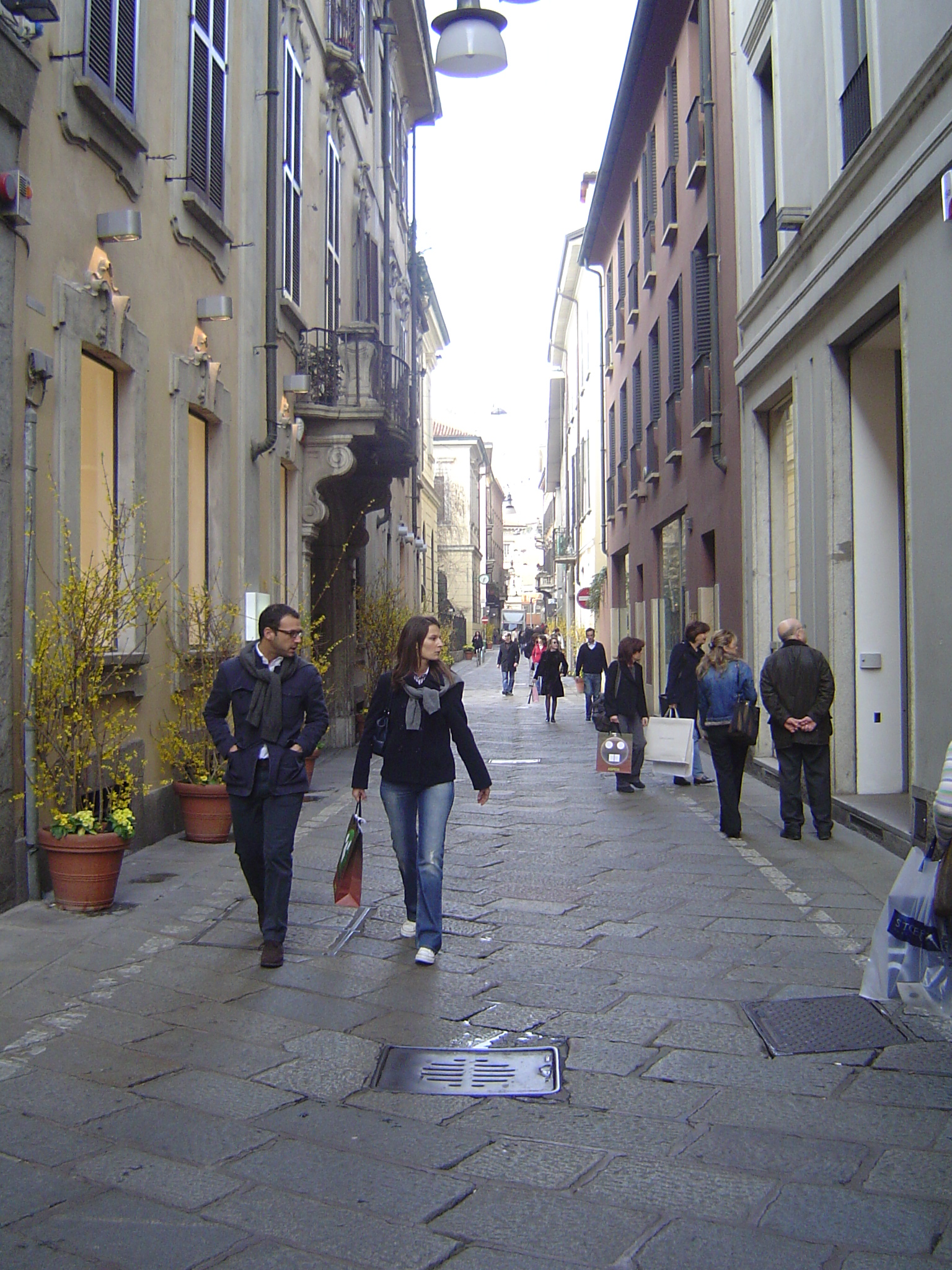 Via della Spiga, in Milan’s Quadrilatero d’Oro fashionable shopping district